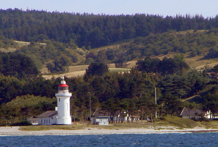 Sletterhage Fyr set fra hurtigfærgen